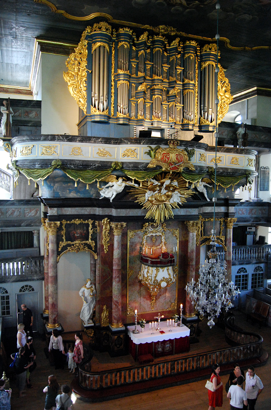 Kongsberg kirke. Alterparti og orgel.